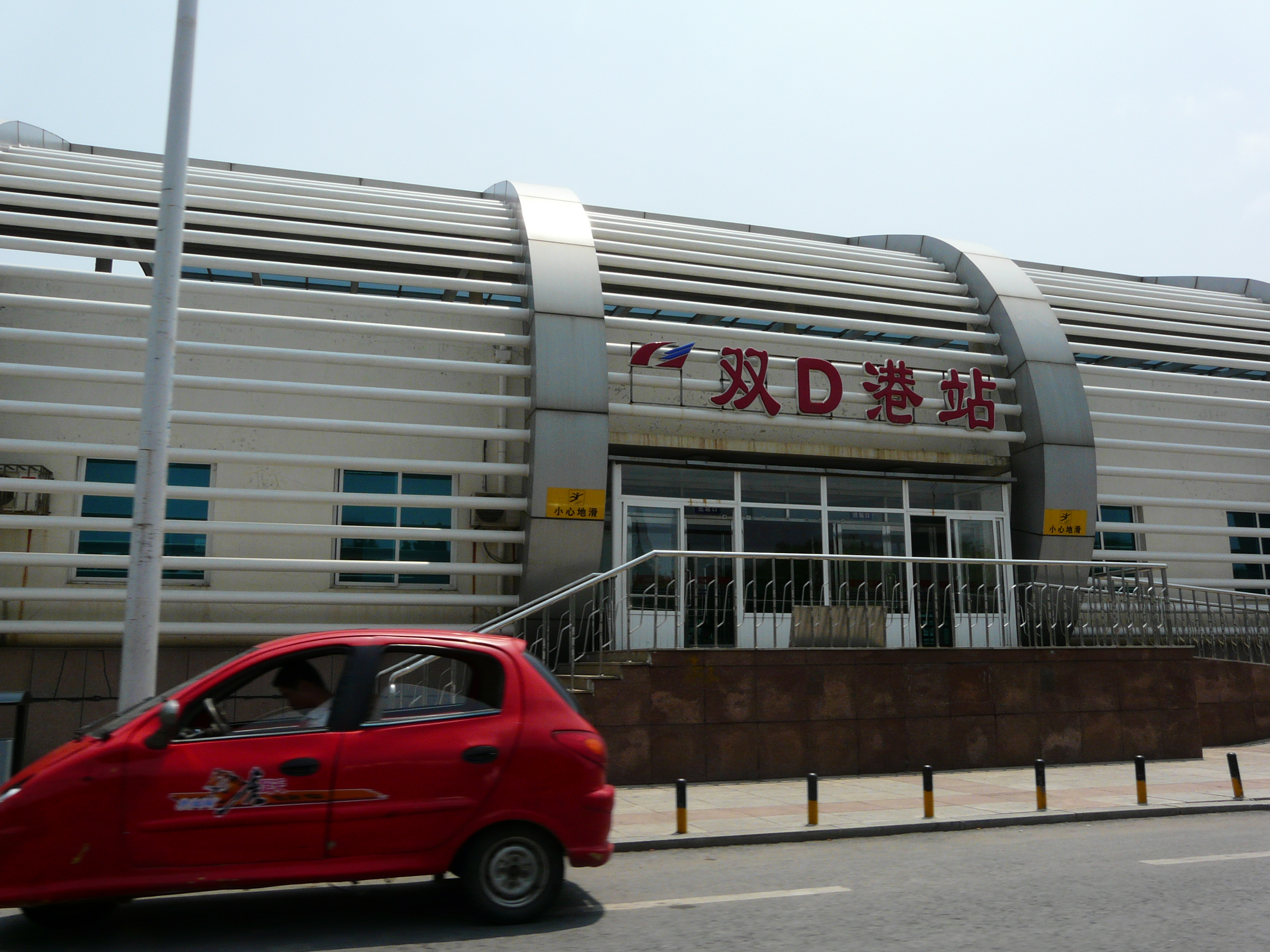 双D港駅